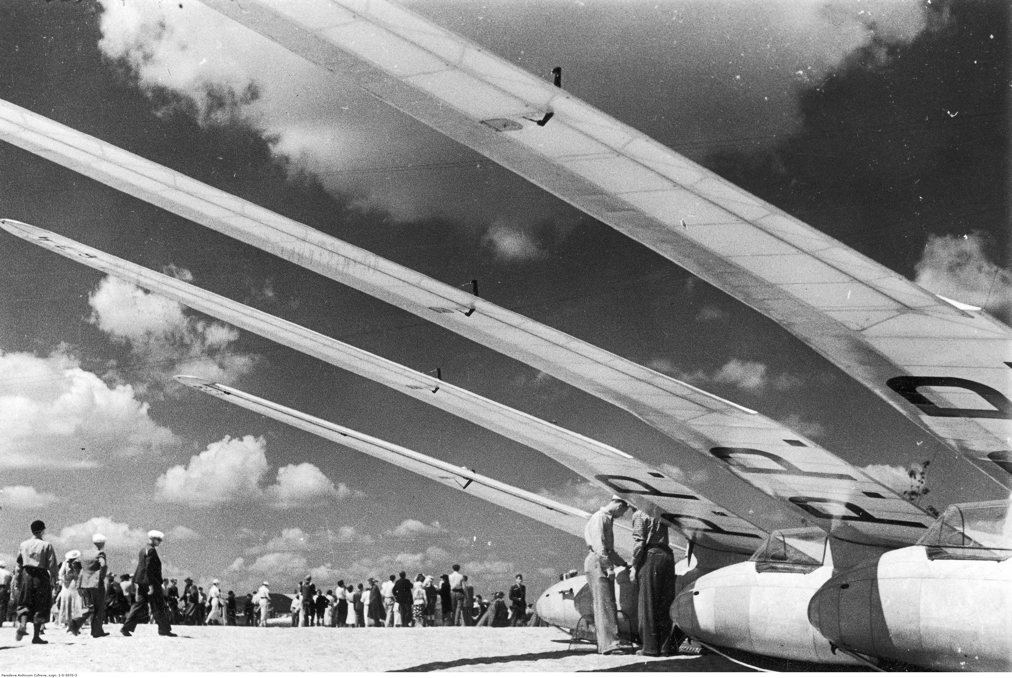 IV Krajowe Zawody Szybowcowe w Ustjanowej